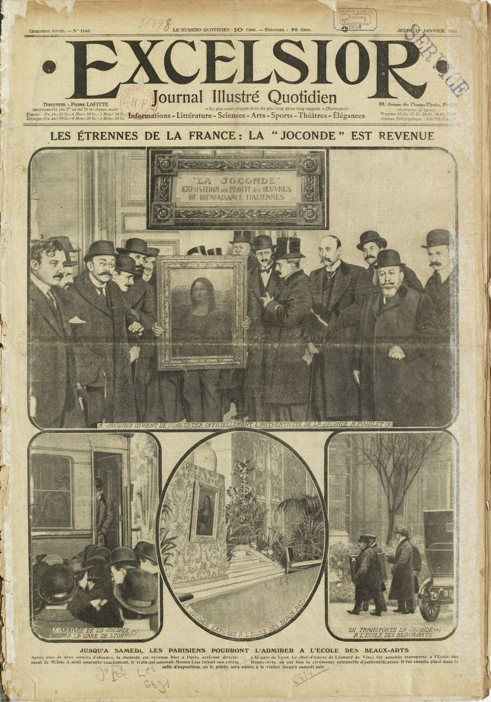 Excelsior, journal illustré quotidien, La Joconde est Revenue, 1 January 1914